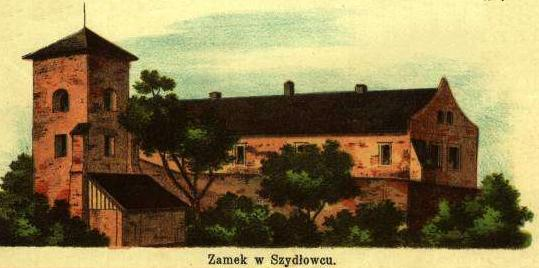 Rysunek zamku w Szydłowcu